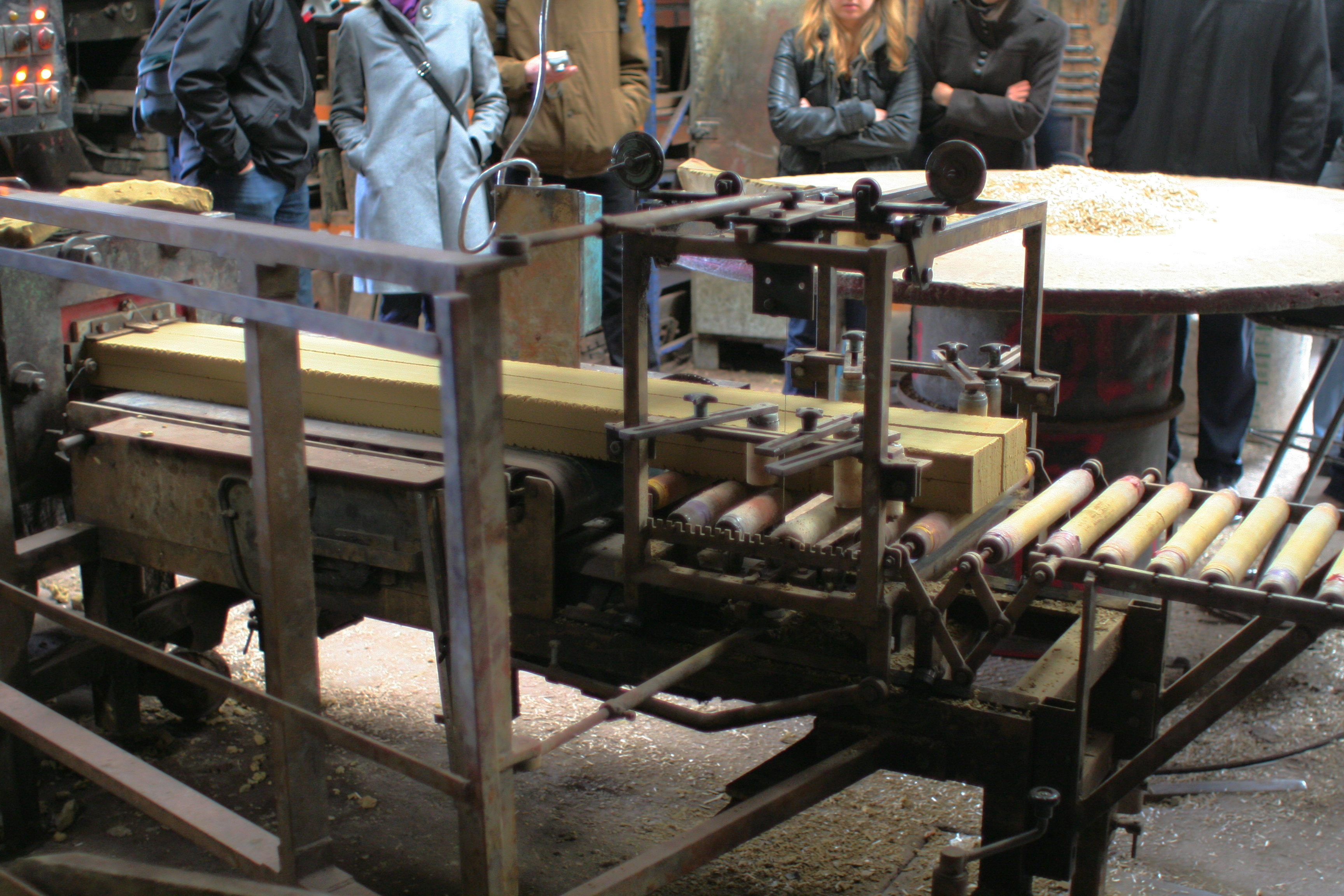 Fabrication de briques : filière (à gauche) et fil à couper le beurre (à droite).